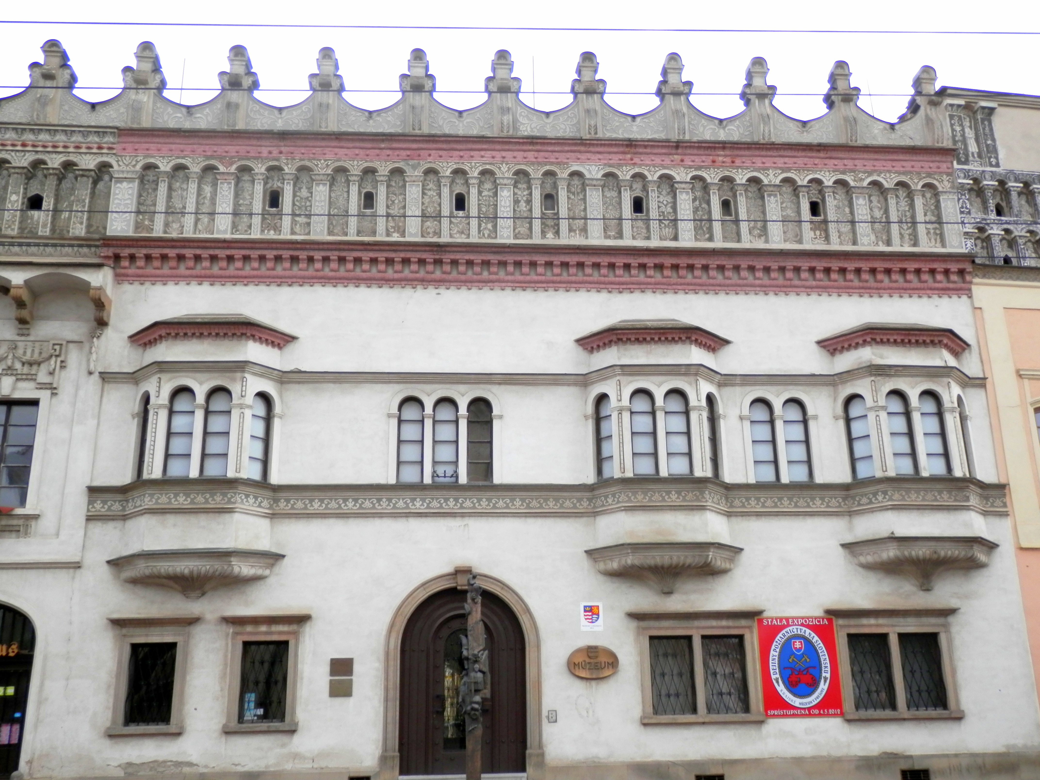 Historické meštianske domy na Hlavnej ulici č. 86. Rákociho palác. Mesto Prešov